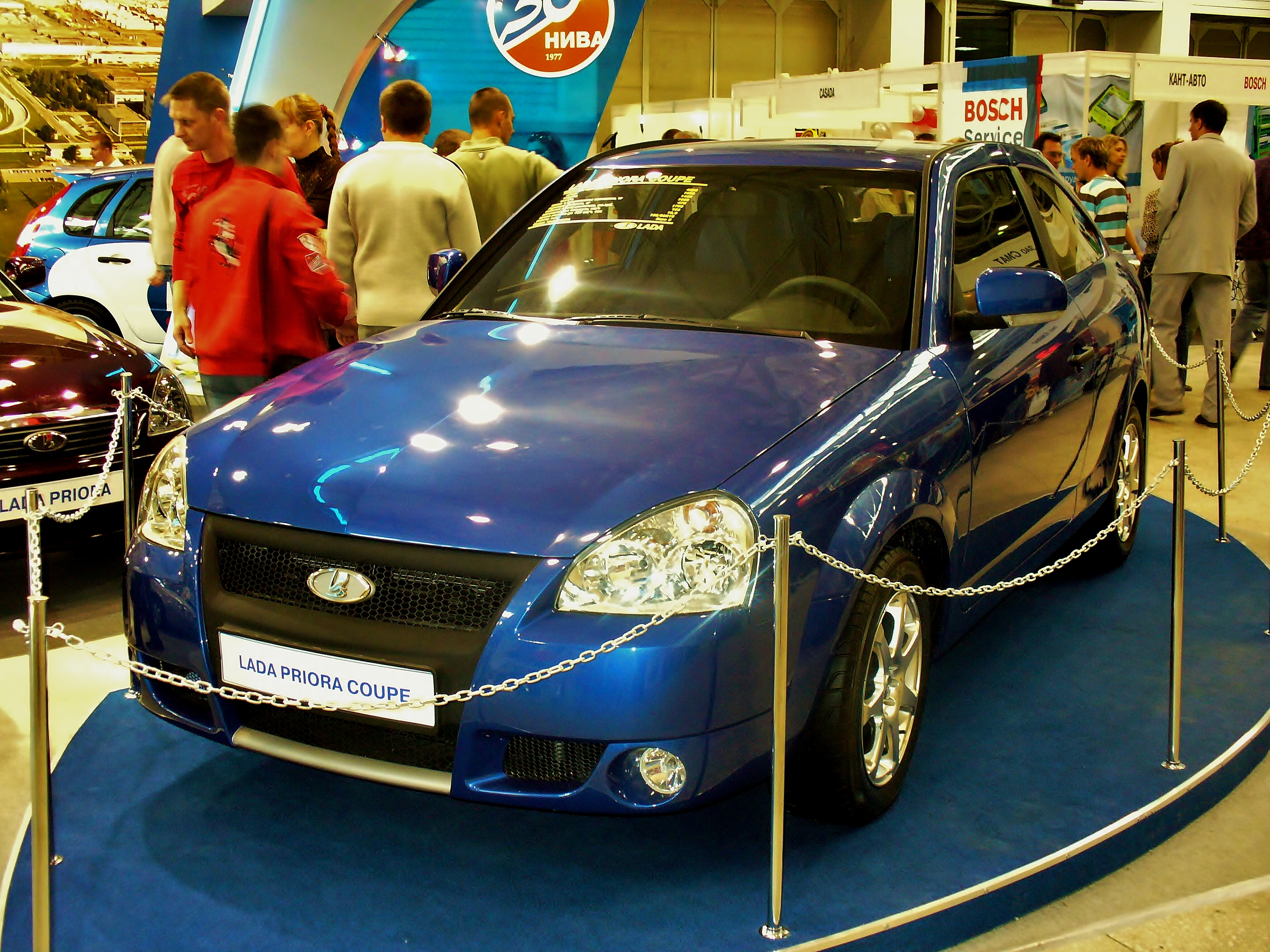 ВАЗ-21728 Купе